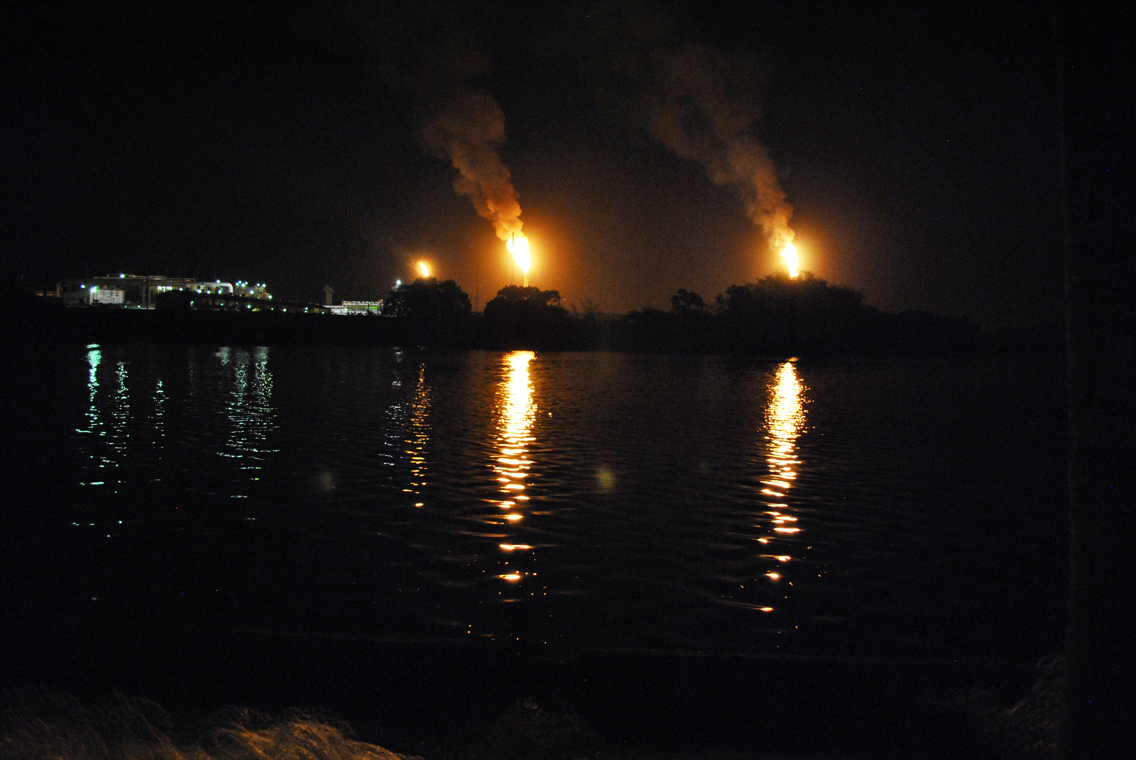 Mecheros quemando gas en la refinería de Dos Bocas, Tabasco, México.